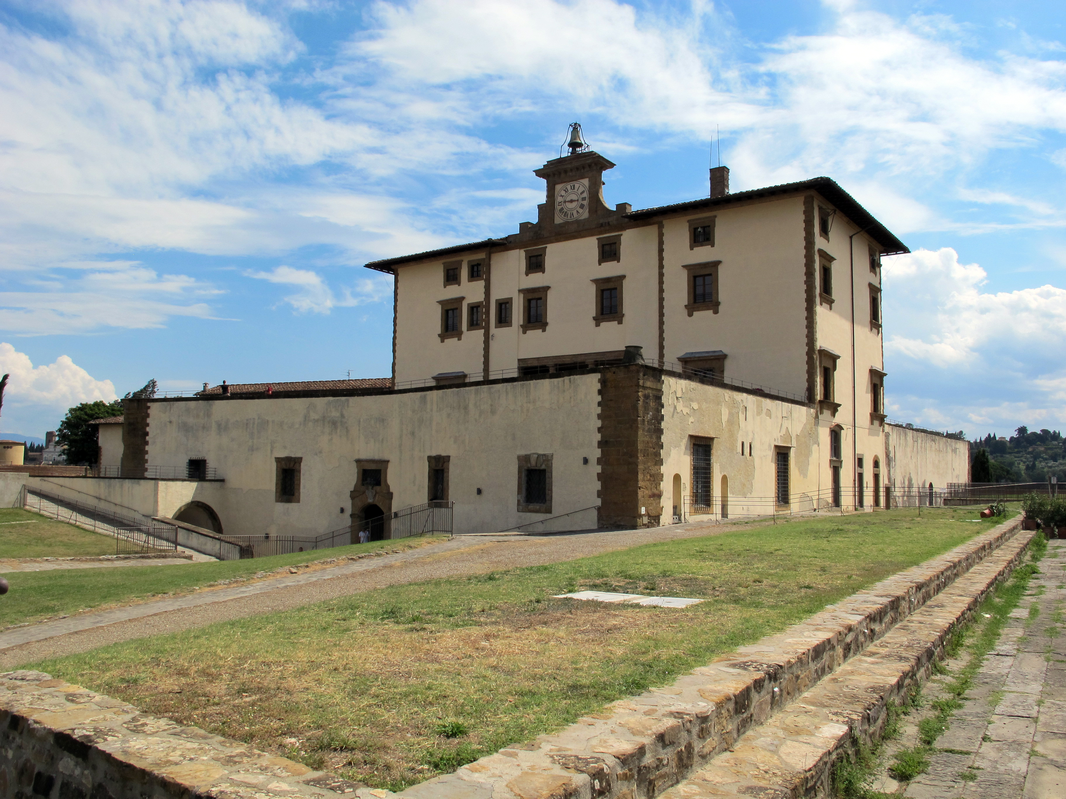 Forte Belvedere, Firenze